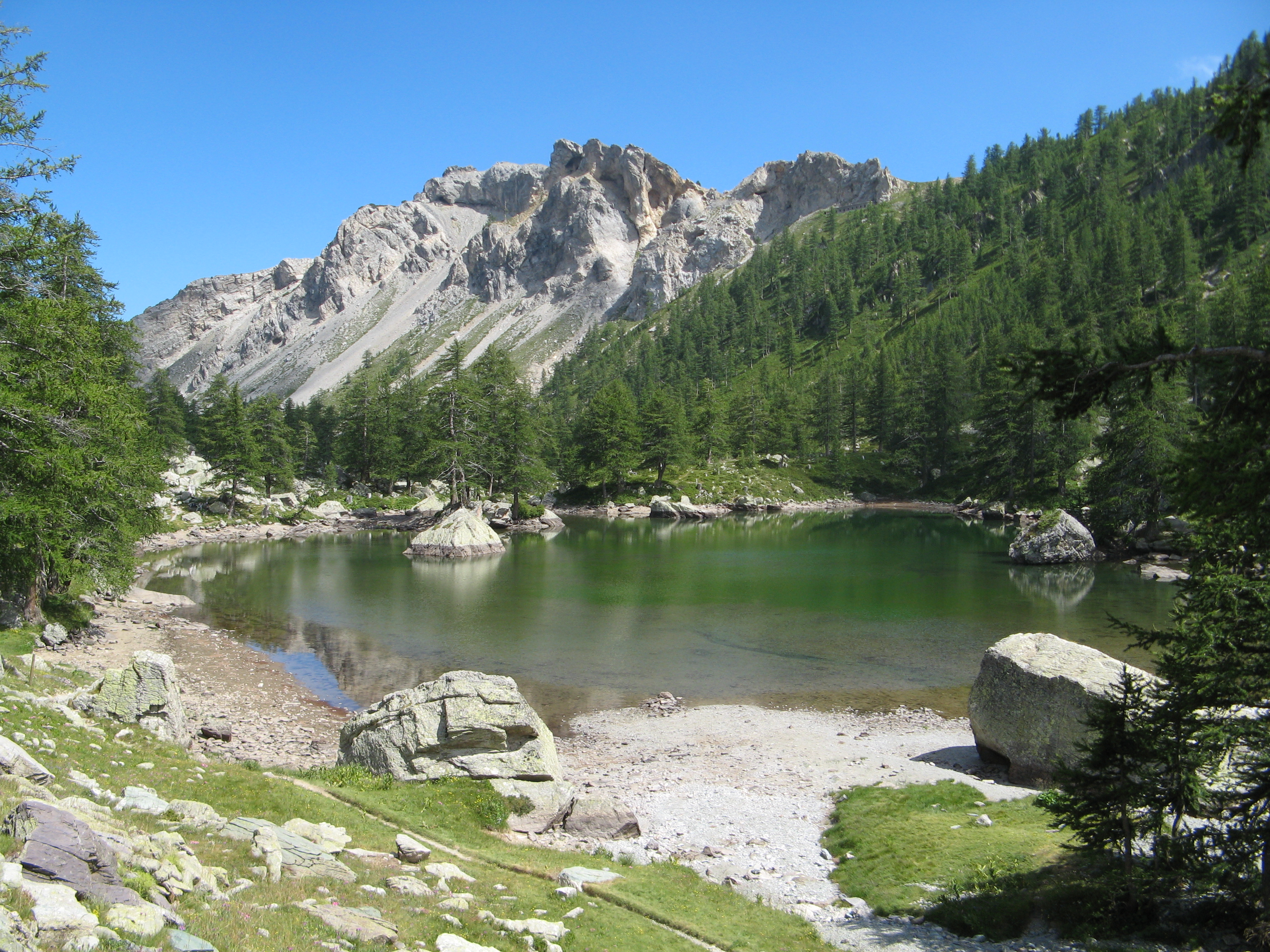 Lac Vert de Fontanalbe, accessible depuis Castérino, dans le Parc National du Mercantour (Alpes-Maritimes)